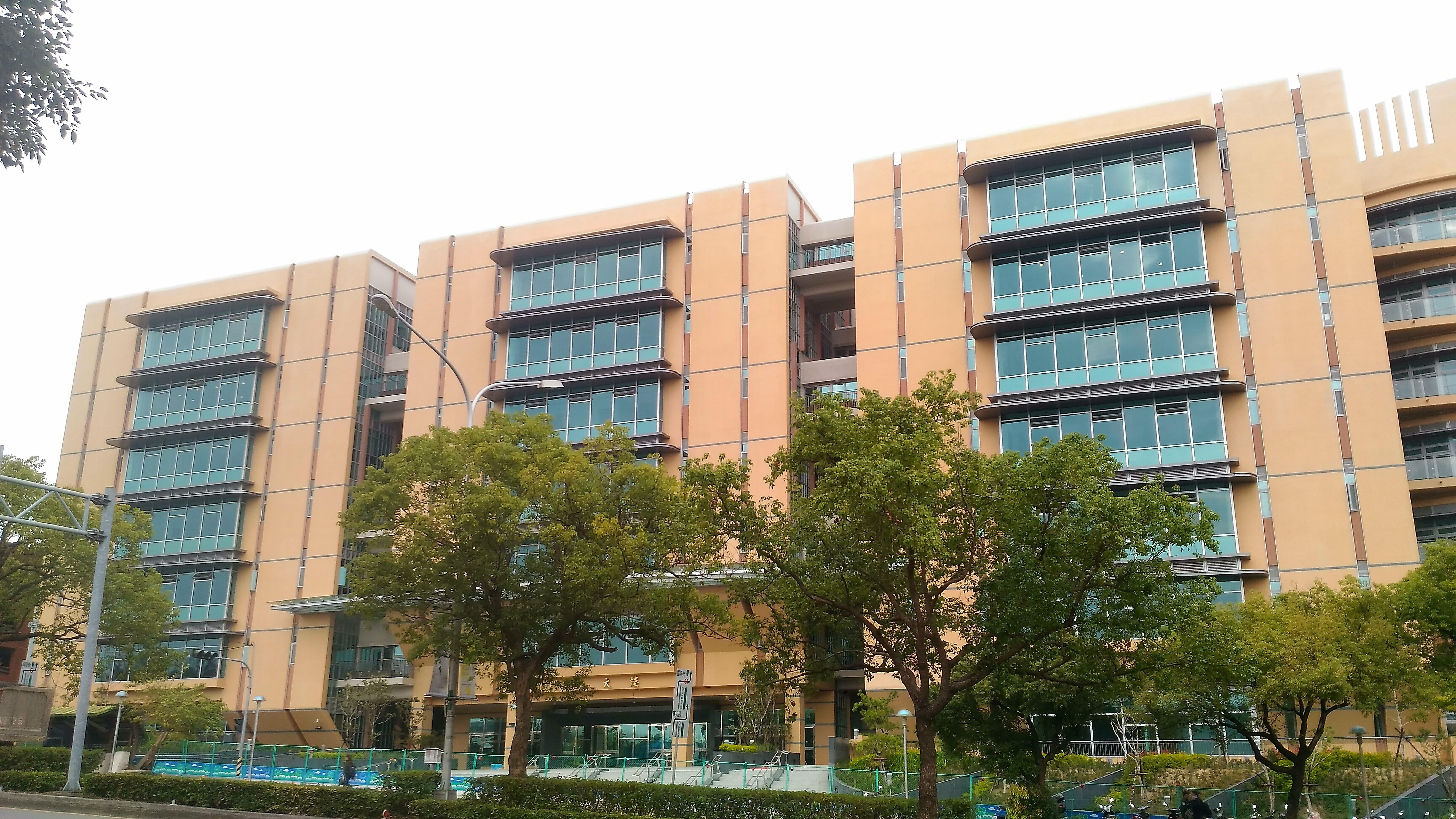 臺中榮民總醫院新門診大樓